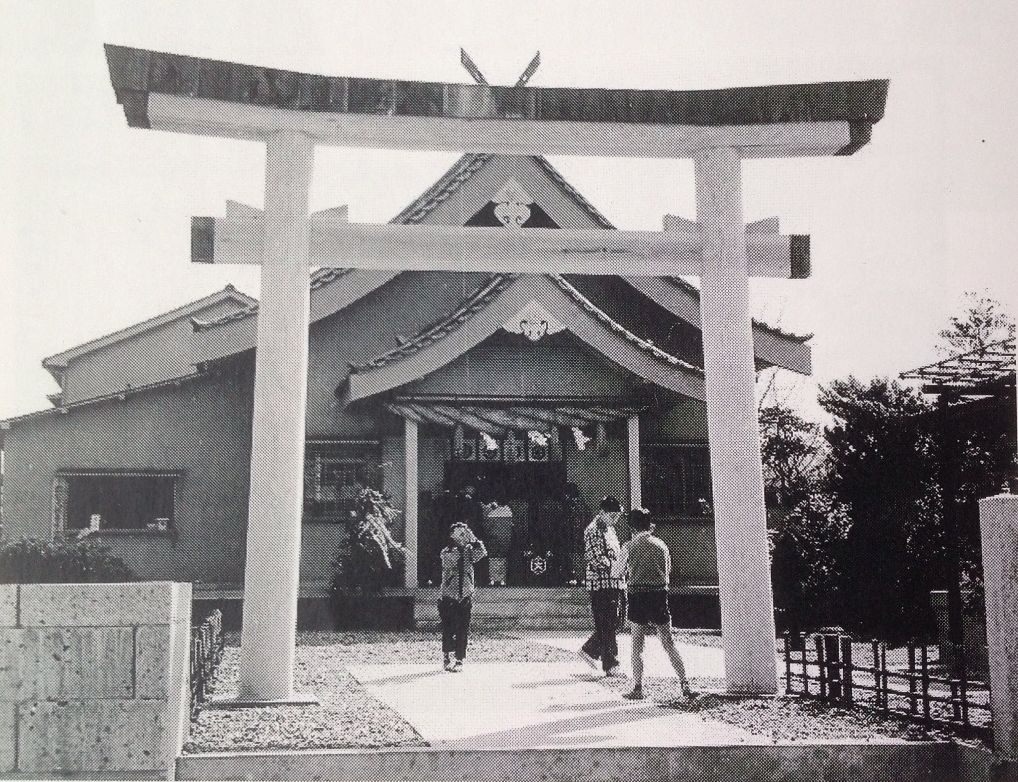 昭和37年、東京分詞再建祝祭。